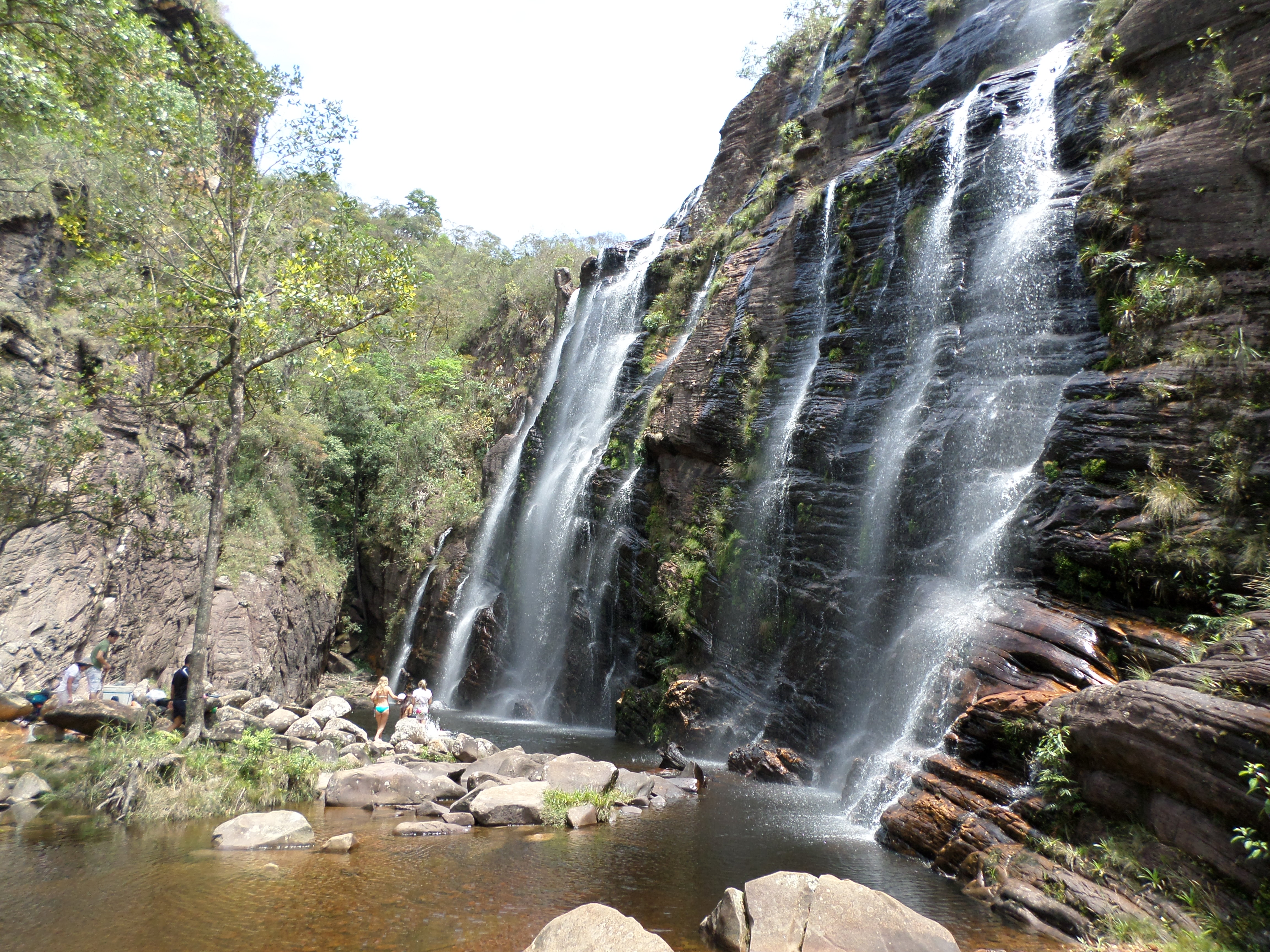 Barão de Cocais - State of Minas Gerais, Brazil